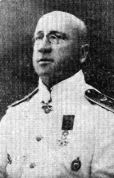 Контр-адмирал Сергей Ворожейкин